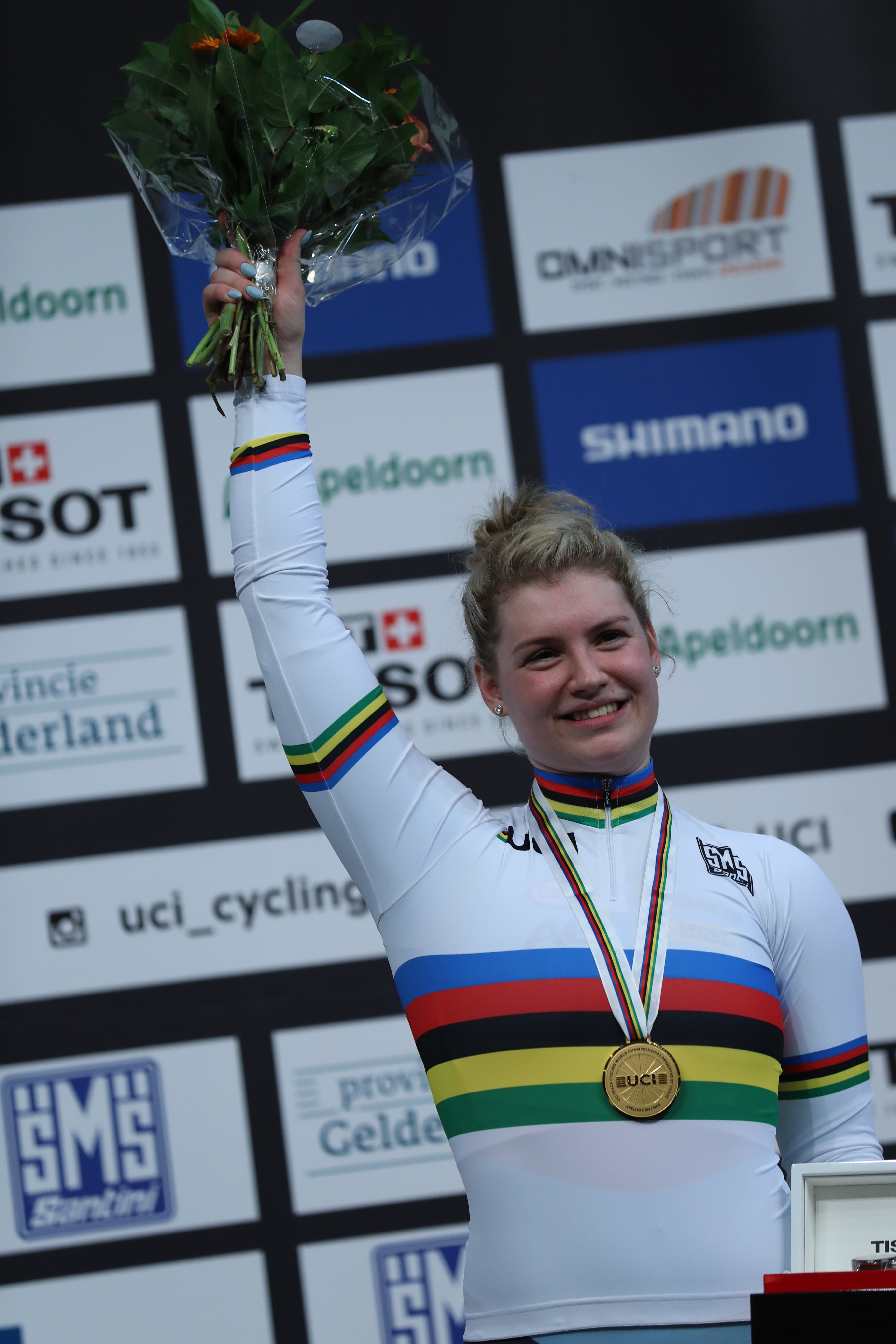 Nicky Degrendele, belg. Radsportlerin - Weltmeisterin im Keirin